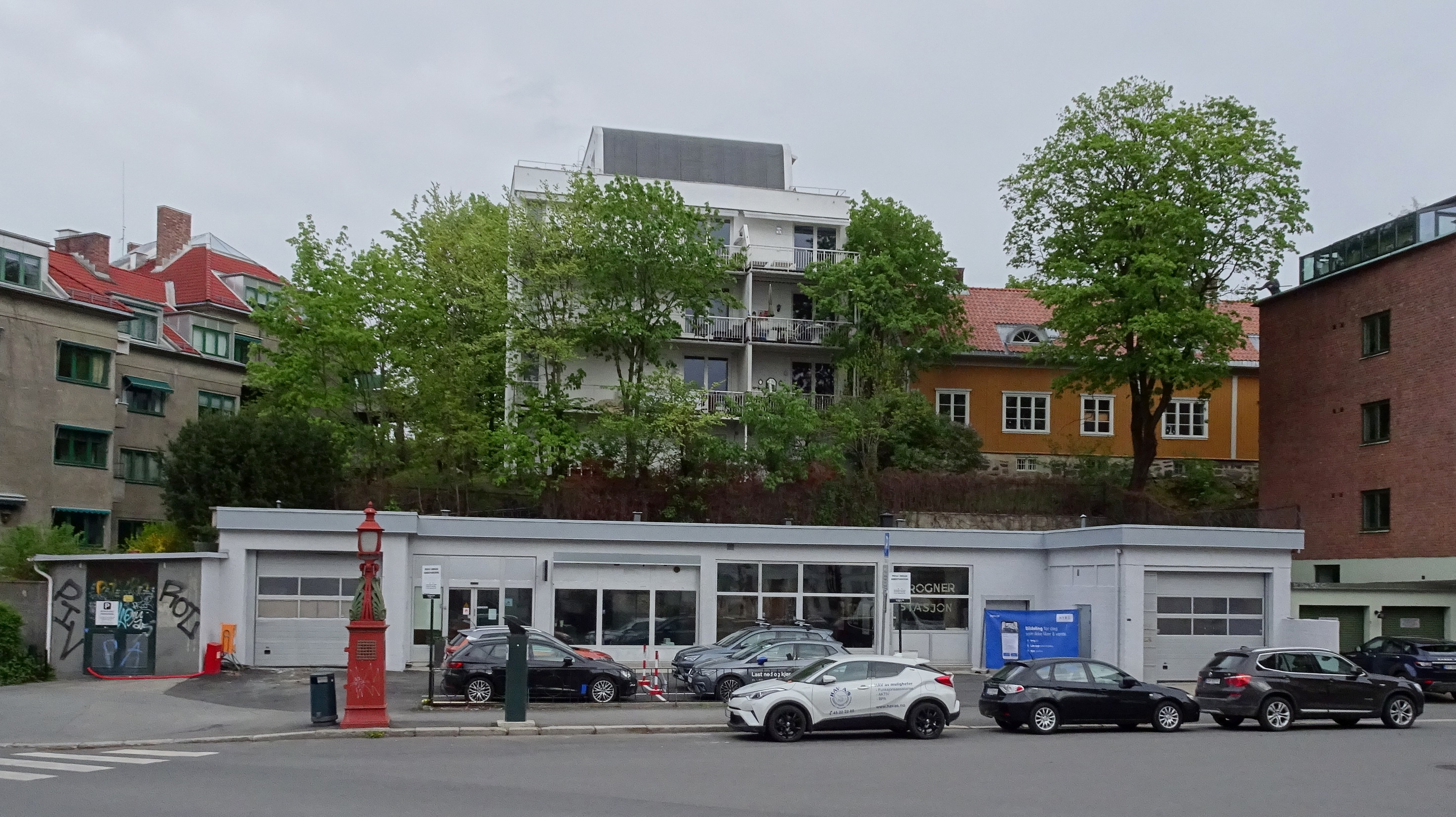 Balders gate 28, der det tidligere lå en bensinstasjon.